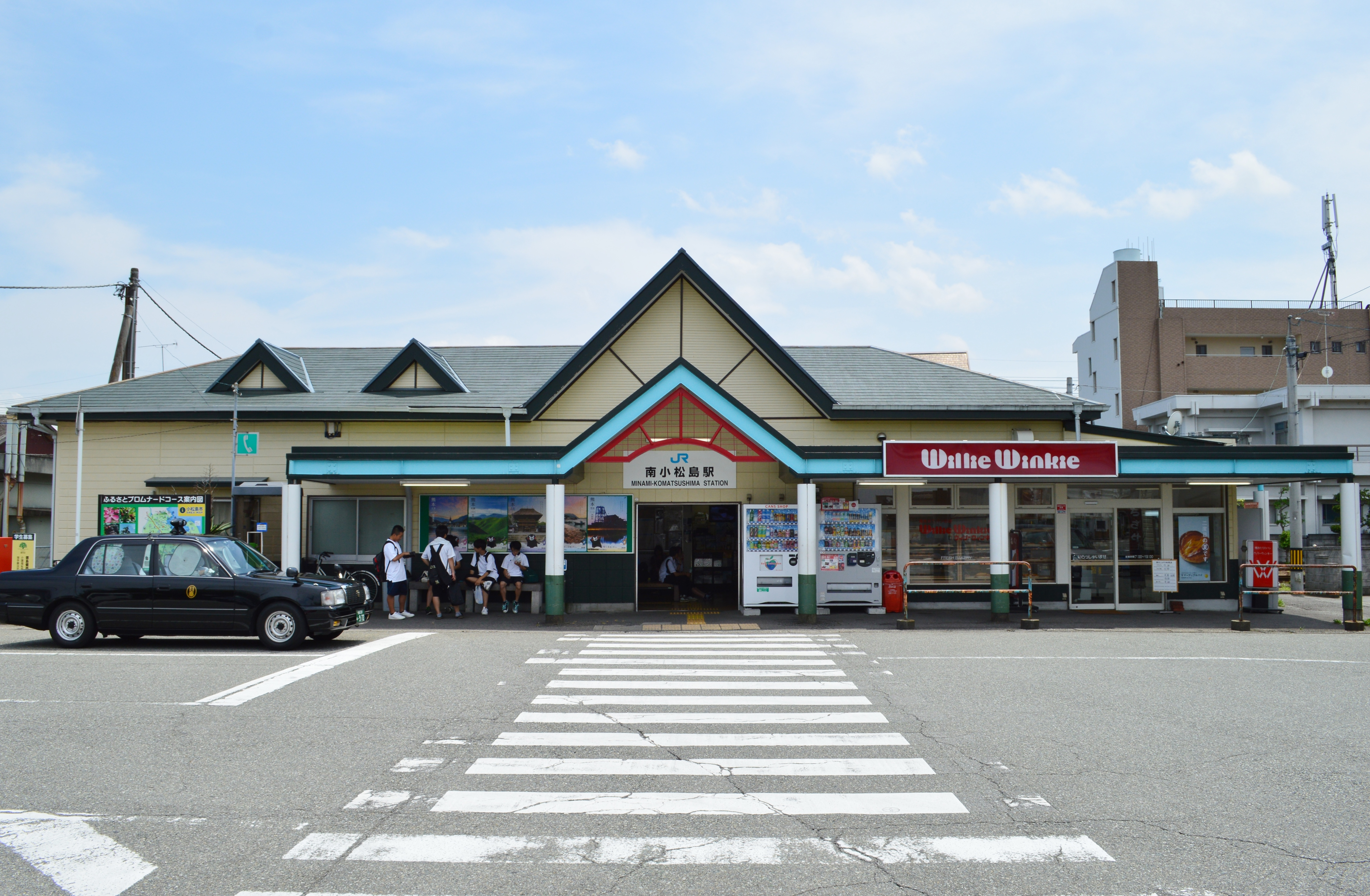 南小松島駅 駅舎